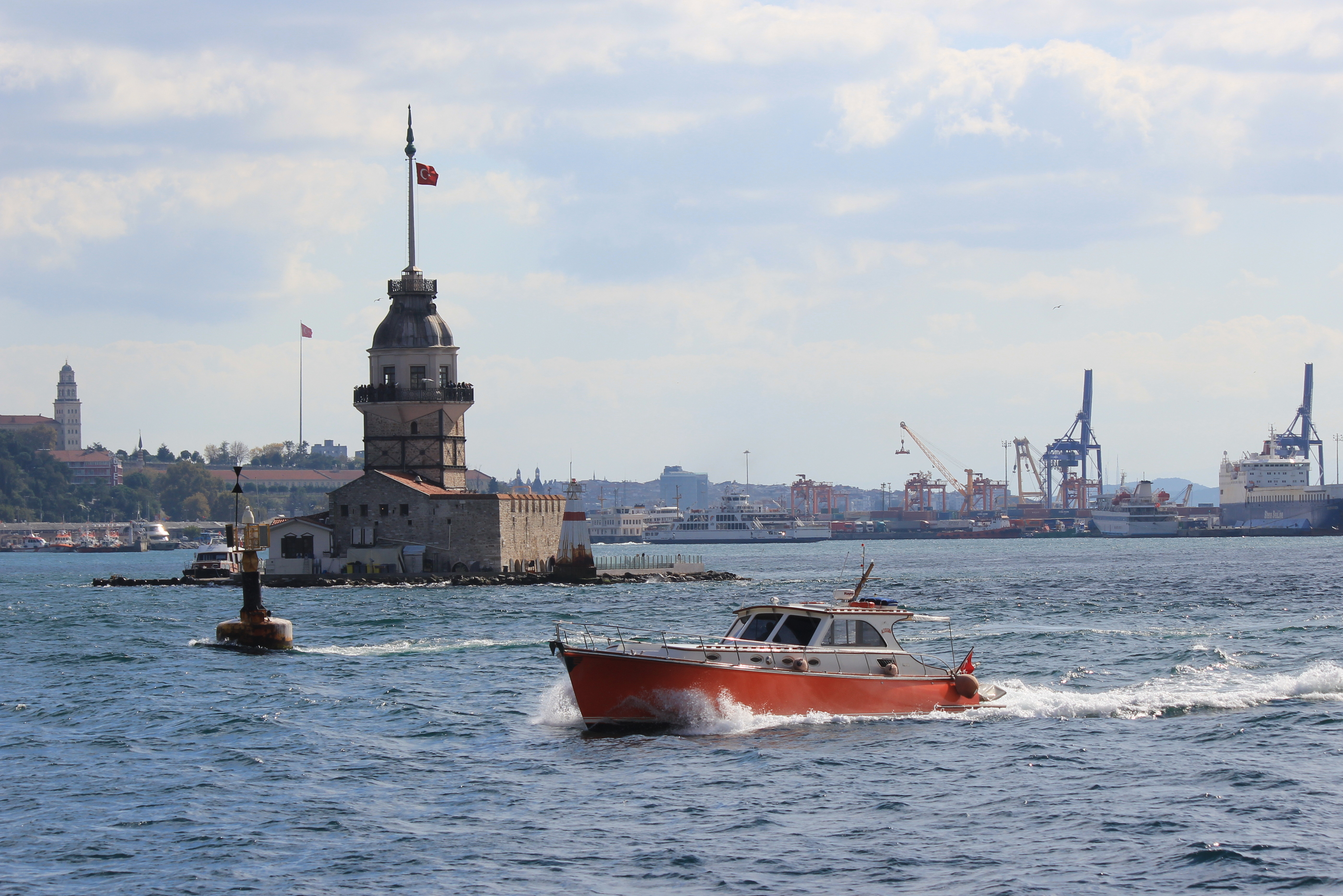 Der Leanderturm im Bosporus, Istanbul.